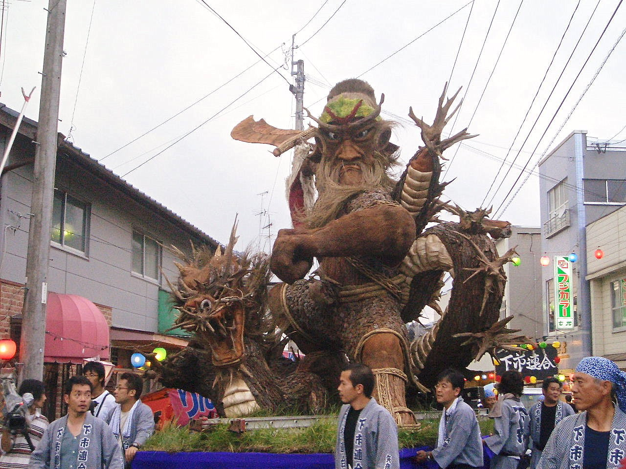 熊本県上益城郡山都町 八朔祭2009 大造り物 下市連合